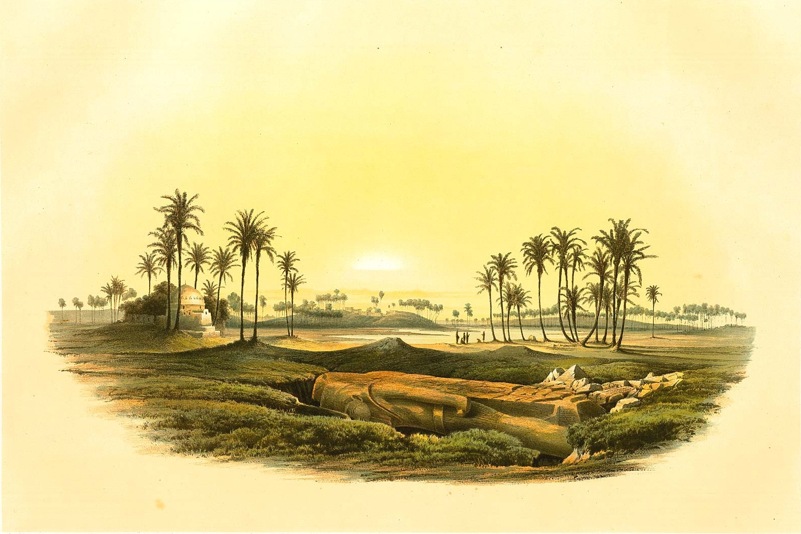 Denkmaeler aus Aegypten und Aethiopien nach den Zeichnungen der von Seiner Majestät dem Koenige von Preussen, Friedrich Wilhelm IV., nach diesen Ländern gesendeten, und in den Jahren 1842–1845 ausgeführten wissenschaftlichen Expedition auf Befehl Seiner Majestät